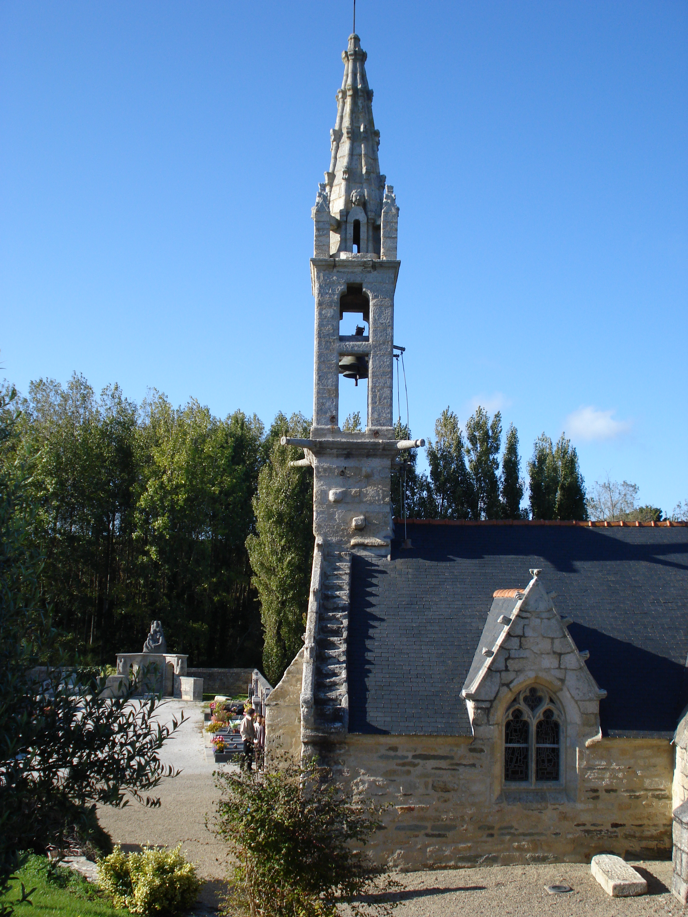 ëglise de Lababan, tour avec escalier, commune de Pouldreuzic , Finistère